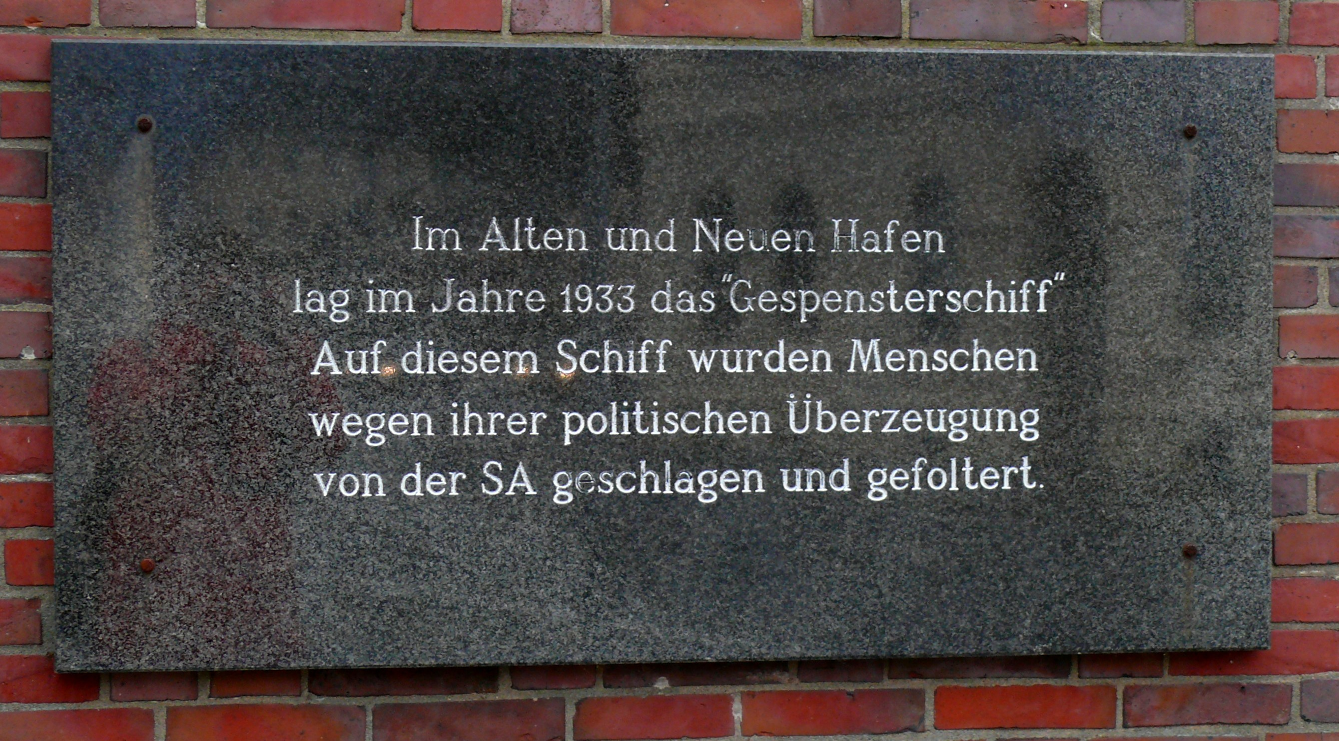 Bremerhaven: Erinnerungstafel „Gespensterschiff“